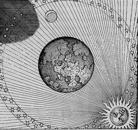 Emblem 45